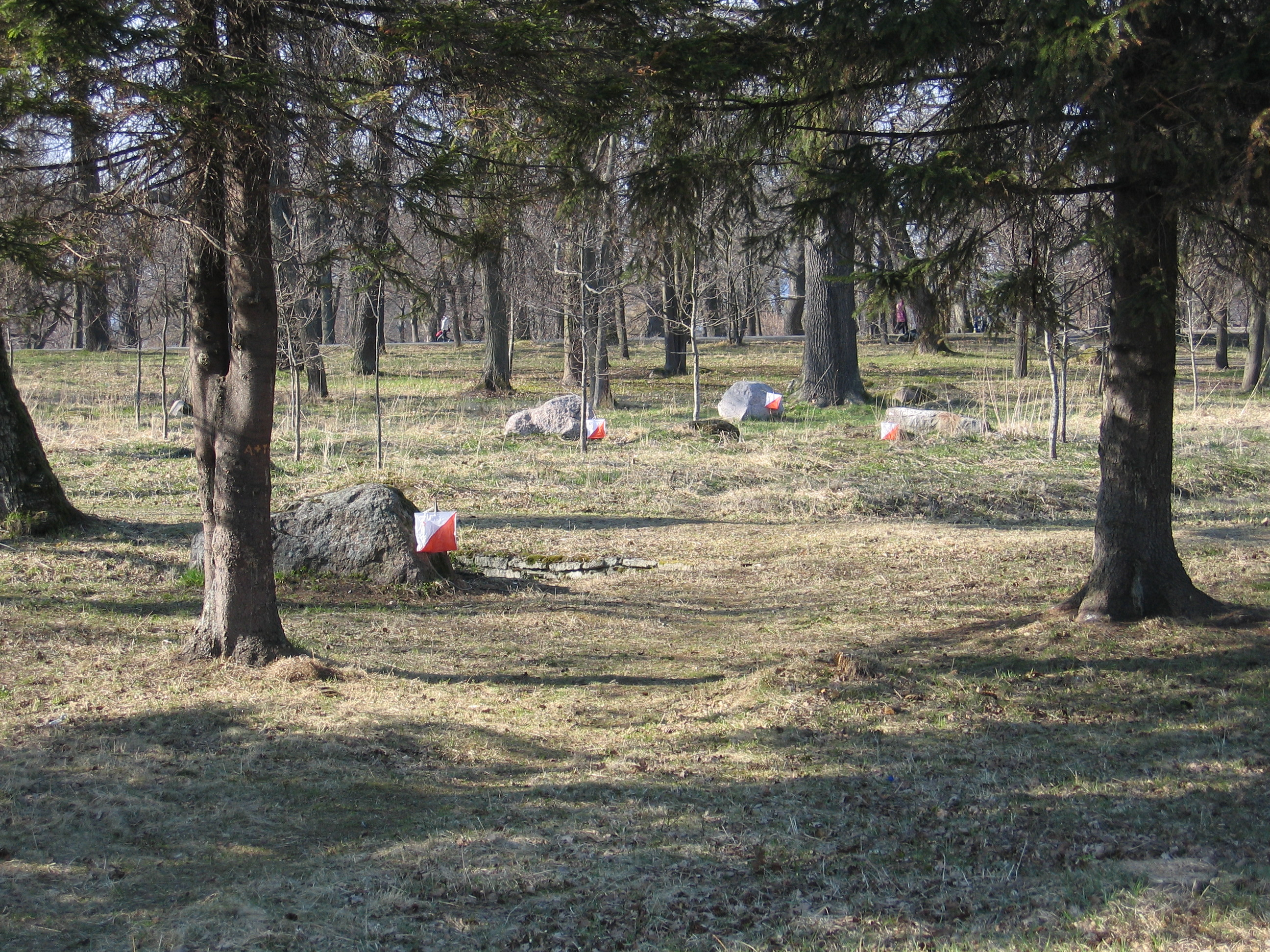 Orienteerumisülesanne teerajaorienteerumises